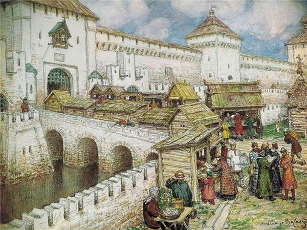 А. М. Васнецов. «Книжные лавочки на Спасском мосту в XVII веке». 1916. Бумага на картоне, акварель, уголь, белила, карандаш. 50 × 67. Музей Москвы, Москва.